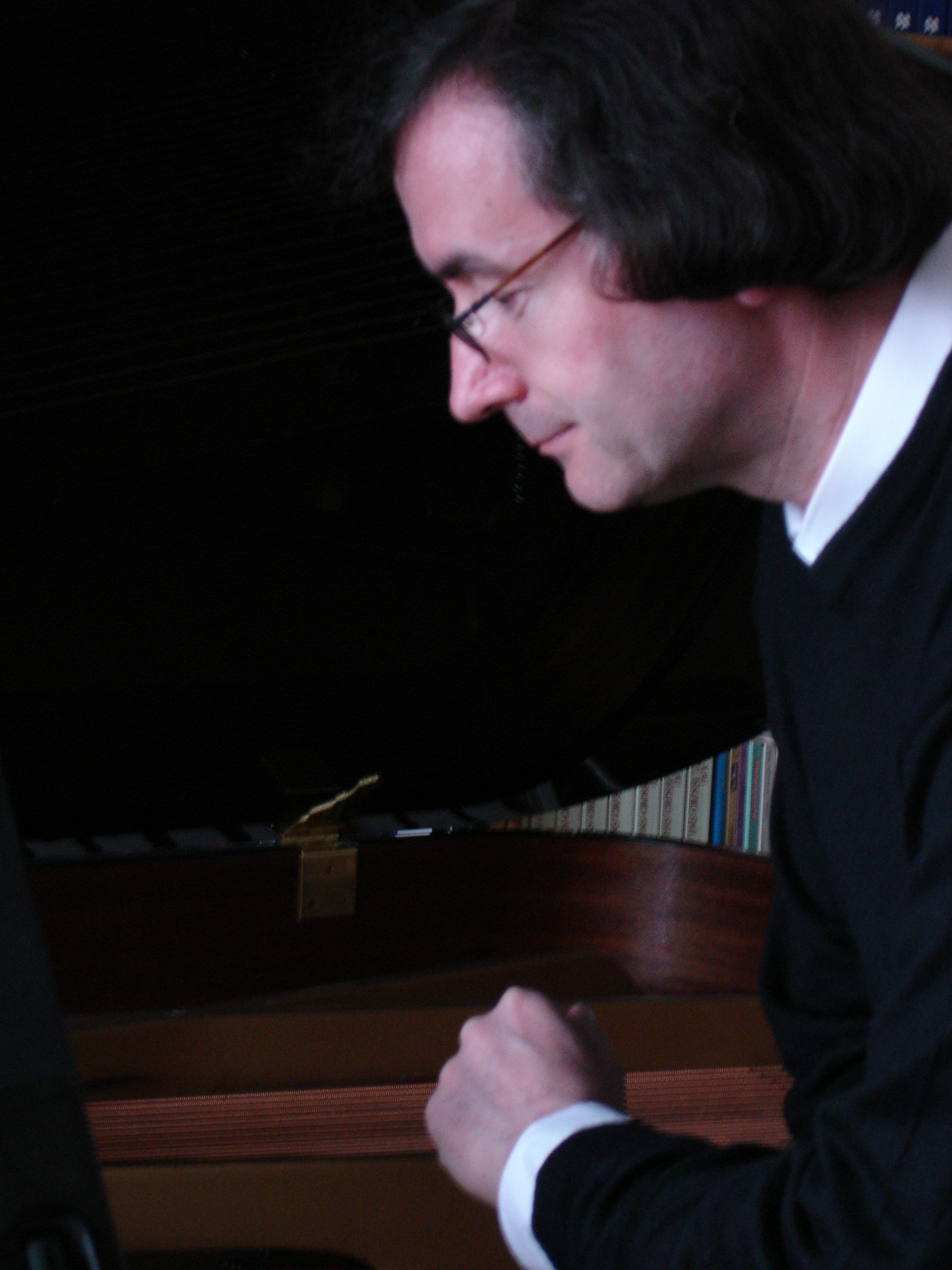 Ludger Stühlmeyer – Kirchenmusiker, Musikwissenschaftler, Komponist